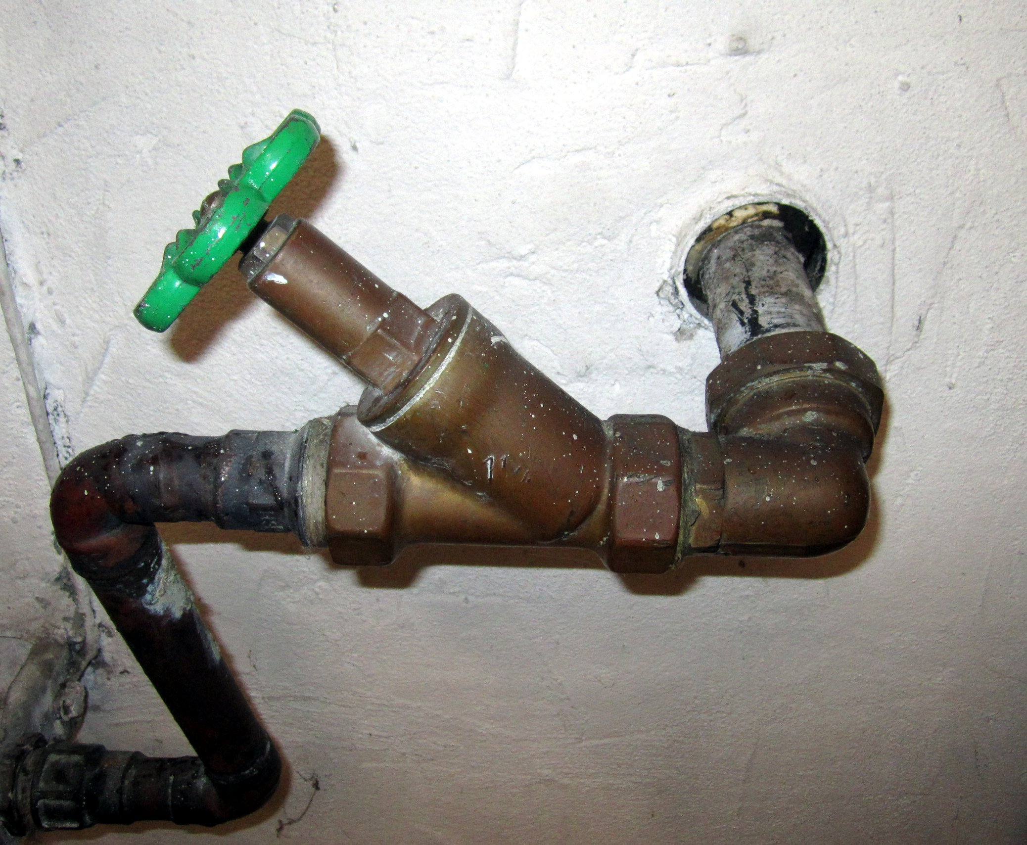 Wasser-Hauseinführung mit Absperrventil